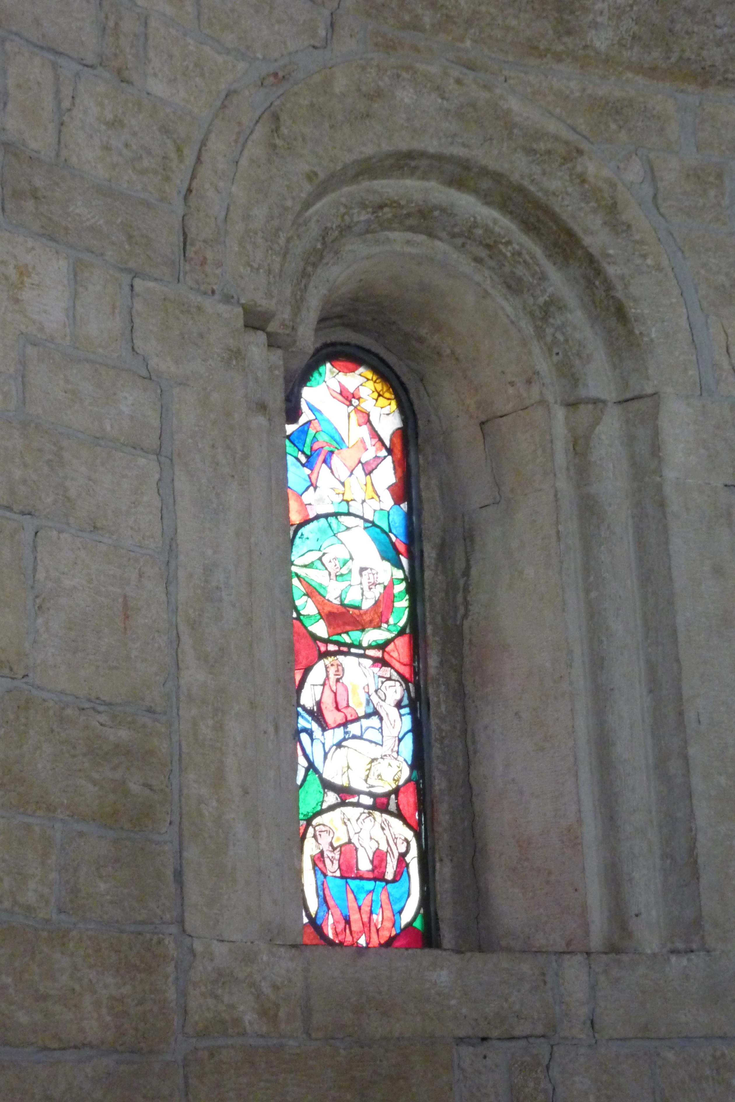 Katholische Pfarrkirche St. Vitus in Reistingen (Gemeinde Ziertheim), romanisches Apsisfenster mit moderner Verglasung